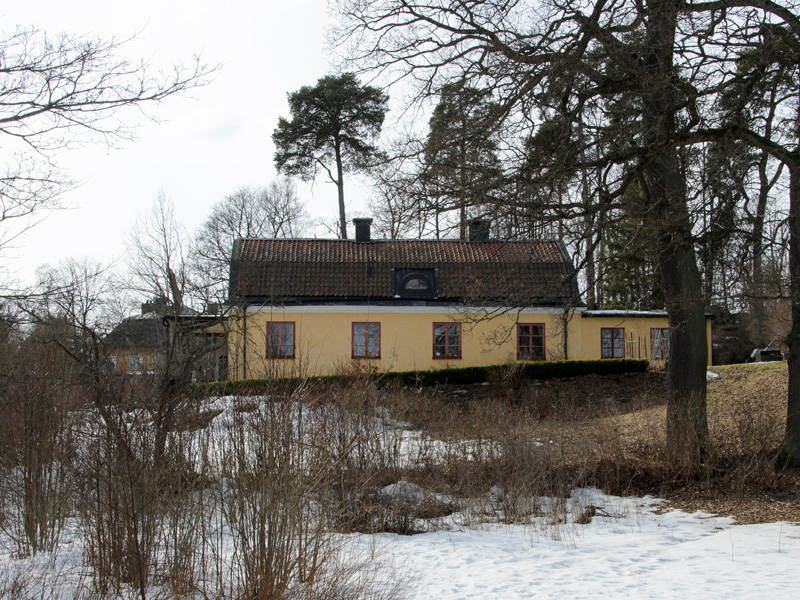 Rådans rättarboställe